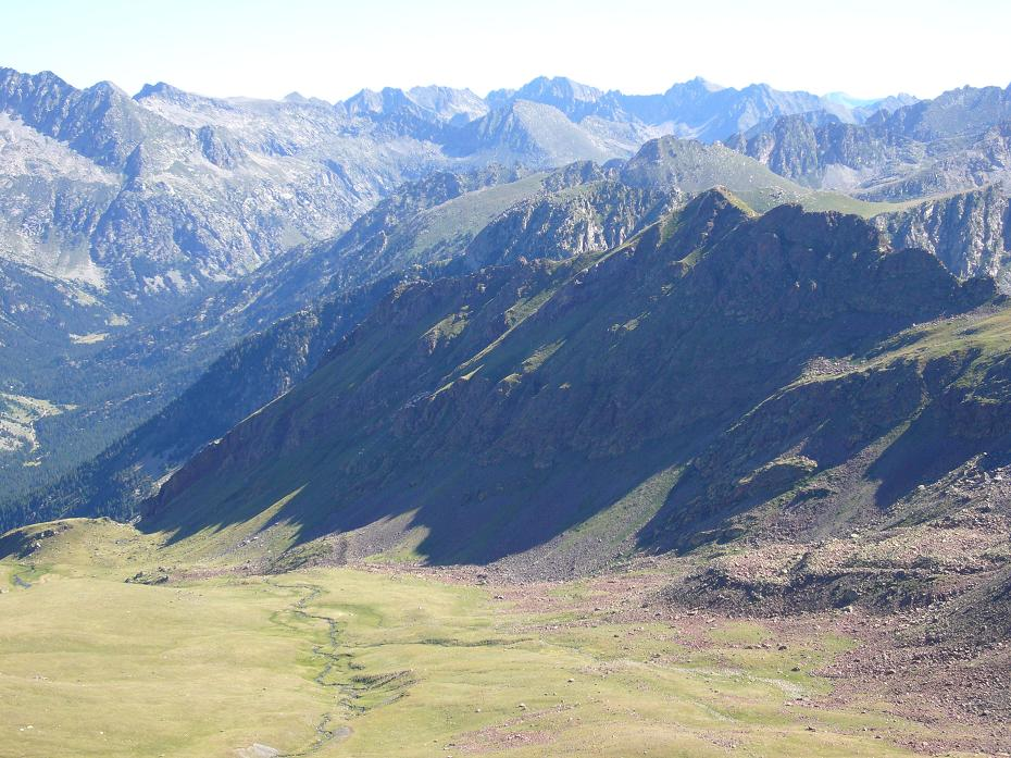 Bony del Graller vist des del Tuc dels Carants; la Vall de Boí, Alta Ribagorça, Catalunya